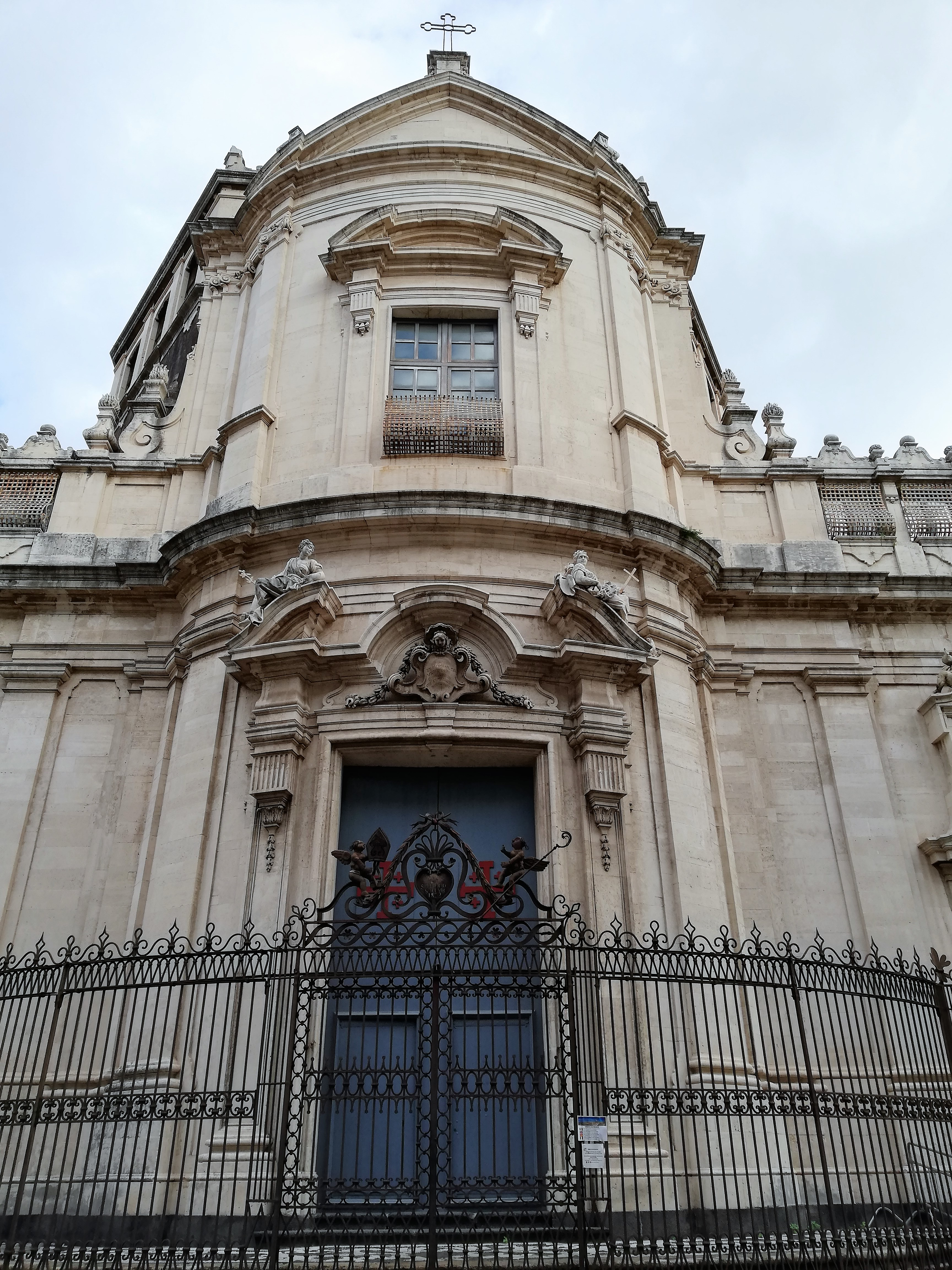 Prospetto.